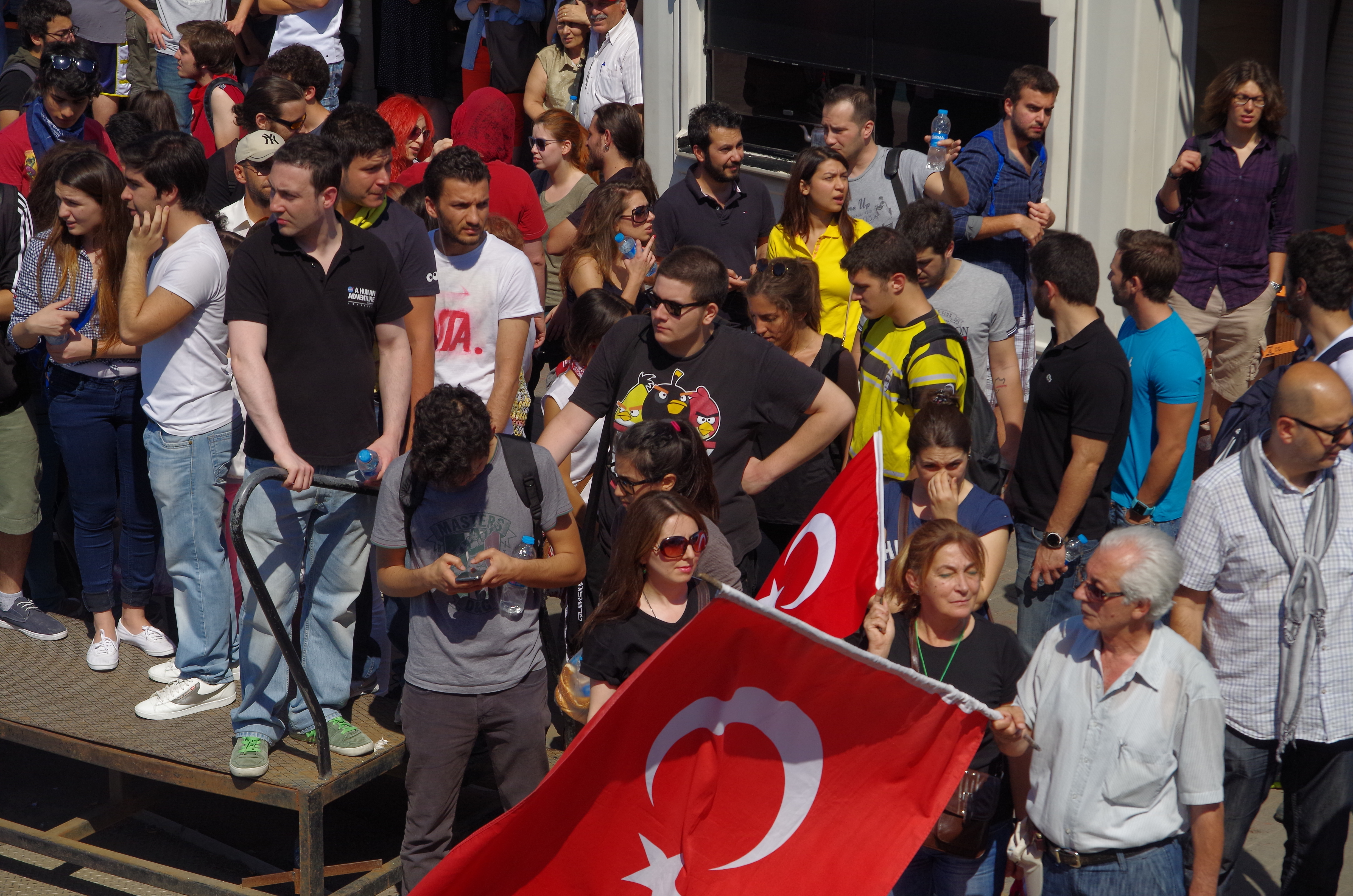 Taksim Square - Gezi Park Protests, İstanbul